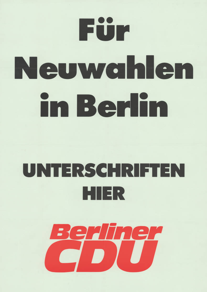 Für Neuwahlen in Berlin Unterschriften hier Berliner CDU Plakatart: Textplakat Allgemein Objekt-Signatur: 10-004 : 600 Bestand: Plakate zu Abgeordnetenhauswahlen Berlin (10-004) GliederungBestand10-18: Plakate zu Abgeordnetenhauswahlen Berlin (10-004) » CDU Lizenz: KAS/ACDP 10-004 : 600 CC-BY-SA 3.0 DE